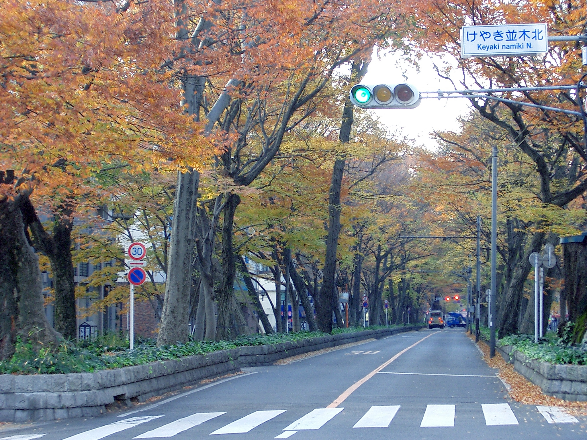 Keyaki Namiki N Cross in Fuchu city, Tokyo, Japan. ja: 東京都府中市 けやき並木北交叉点